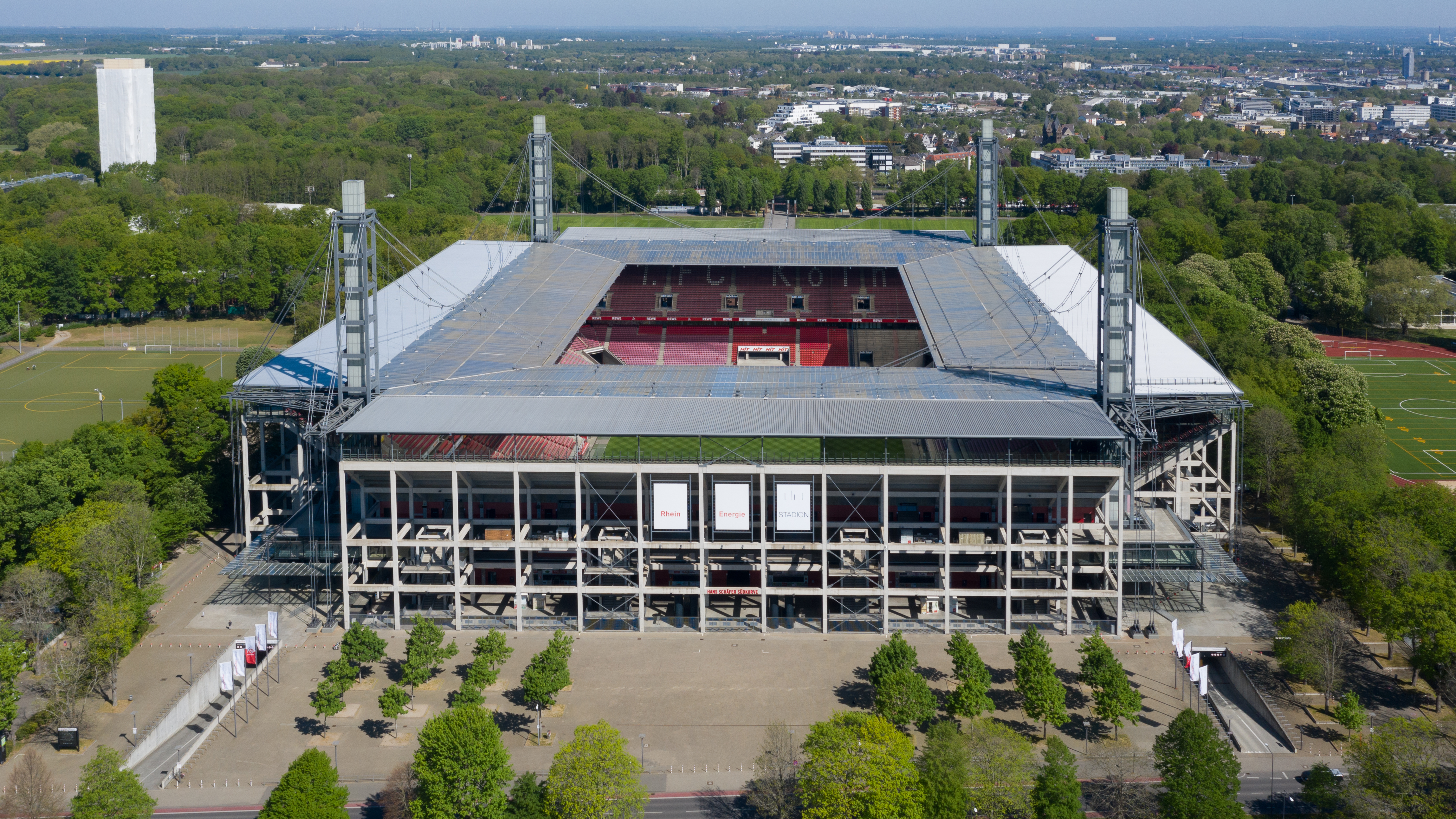 Drohnenaufnahme Rheinenergie-Stadion im Sportpark Müngersdorf